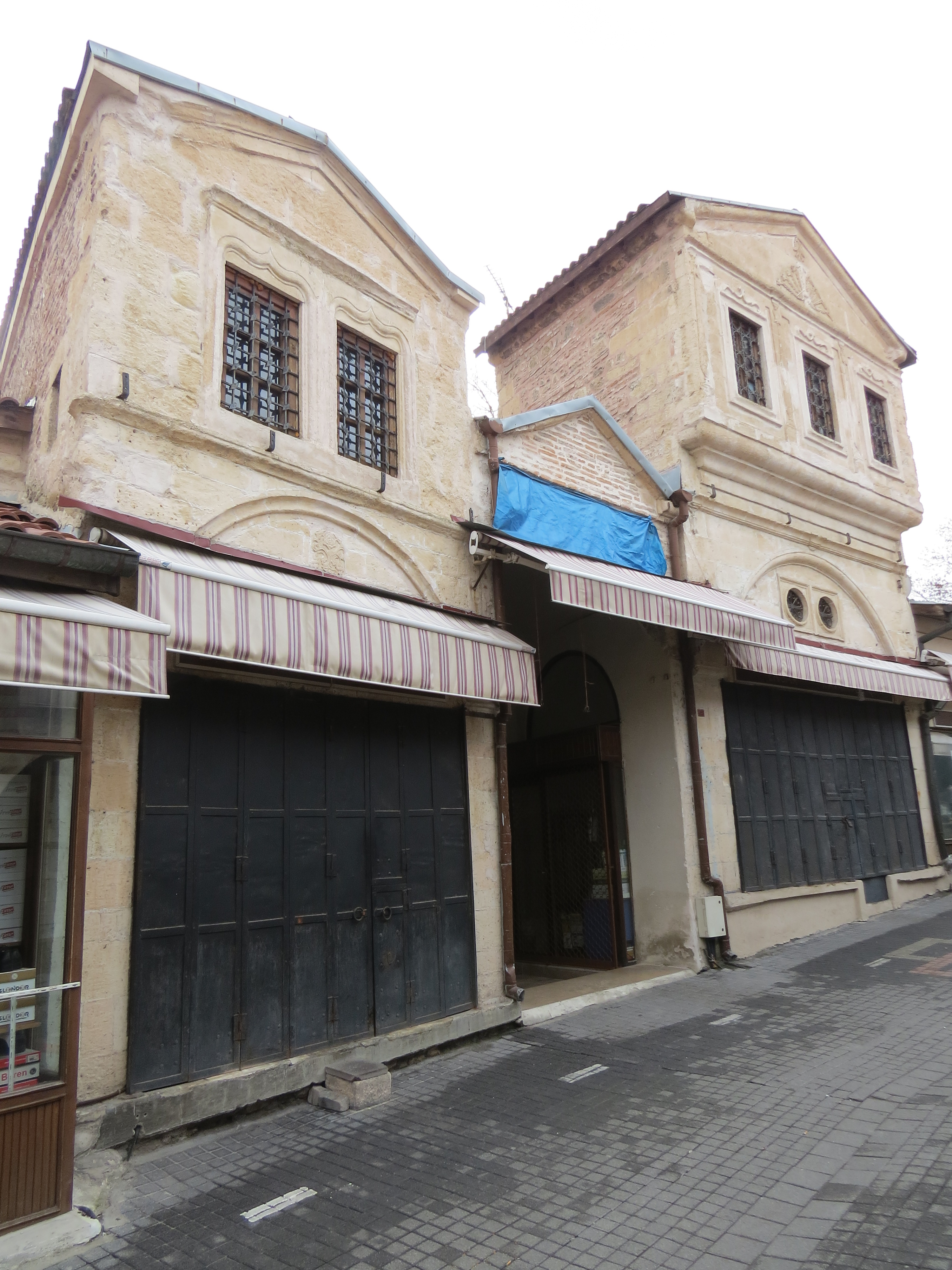 Küçük Bedesten Kütahya